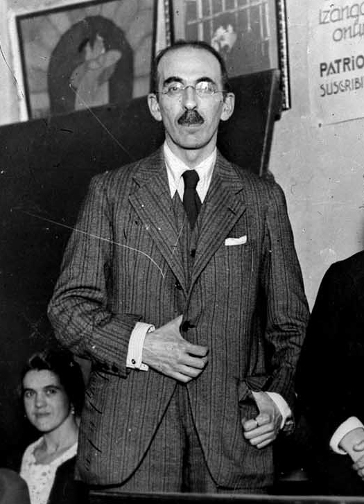 ALCANCE Y CONTENIDO: Batzoki de la calle Bidebarrieta; el primer batzoki, fundado en 1907, estuvo en la calle María Angela. De pie, Manuel de Eguileor, diputado del Partido Nacionalista Vasco, acompañado de Mercedes Careaga y del bertsolari Urretxindorra (Kepa Enbeita) en un acto para promover la suscripción de acciones para la compra del edificio nº 11 de la calle María Angela, donde estuvo el tercer batzoki desde finales de 1933; sentados, Pachi Ascasibar, Josefa Albizu y Crescencia Solozabal. Localización: Eibar